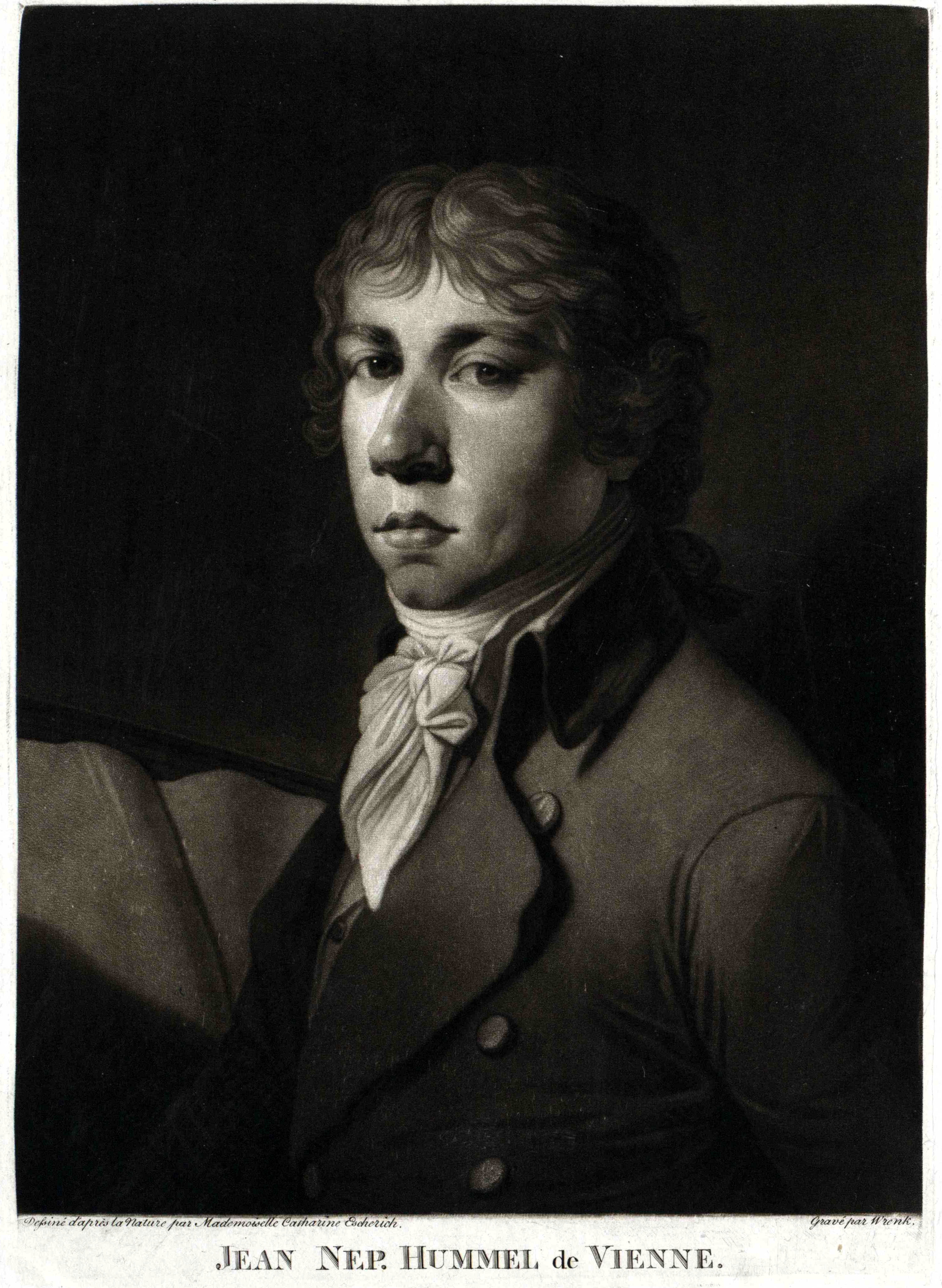 Brustbild Johann Nepomuk Hummel in jüngeren Jahren. Nach ad-vivum-Zeichnung von Katharina Escherich.